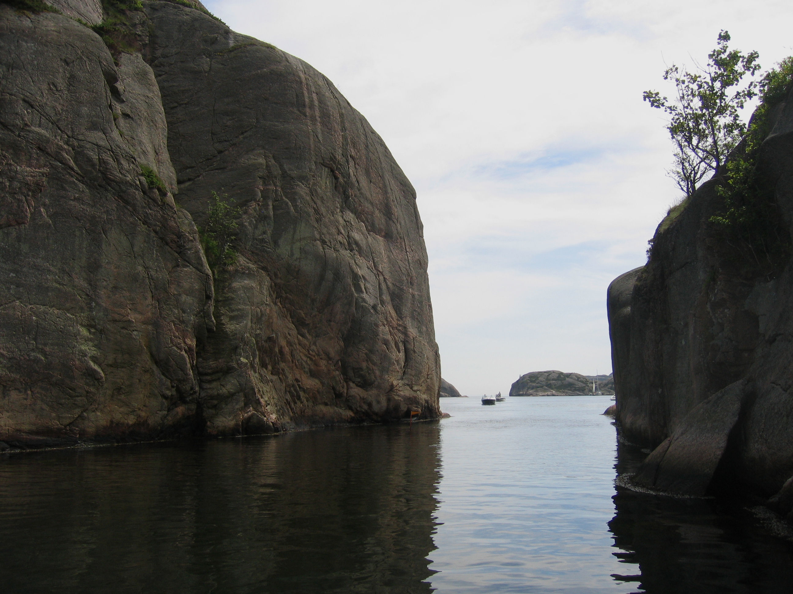 St.Olavs sund i Ny-Hellesund